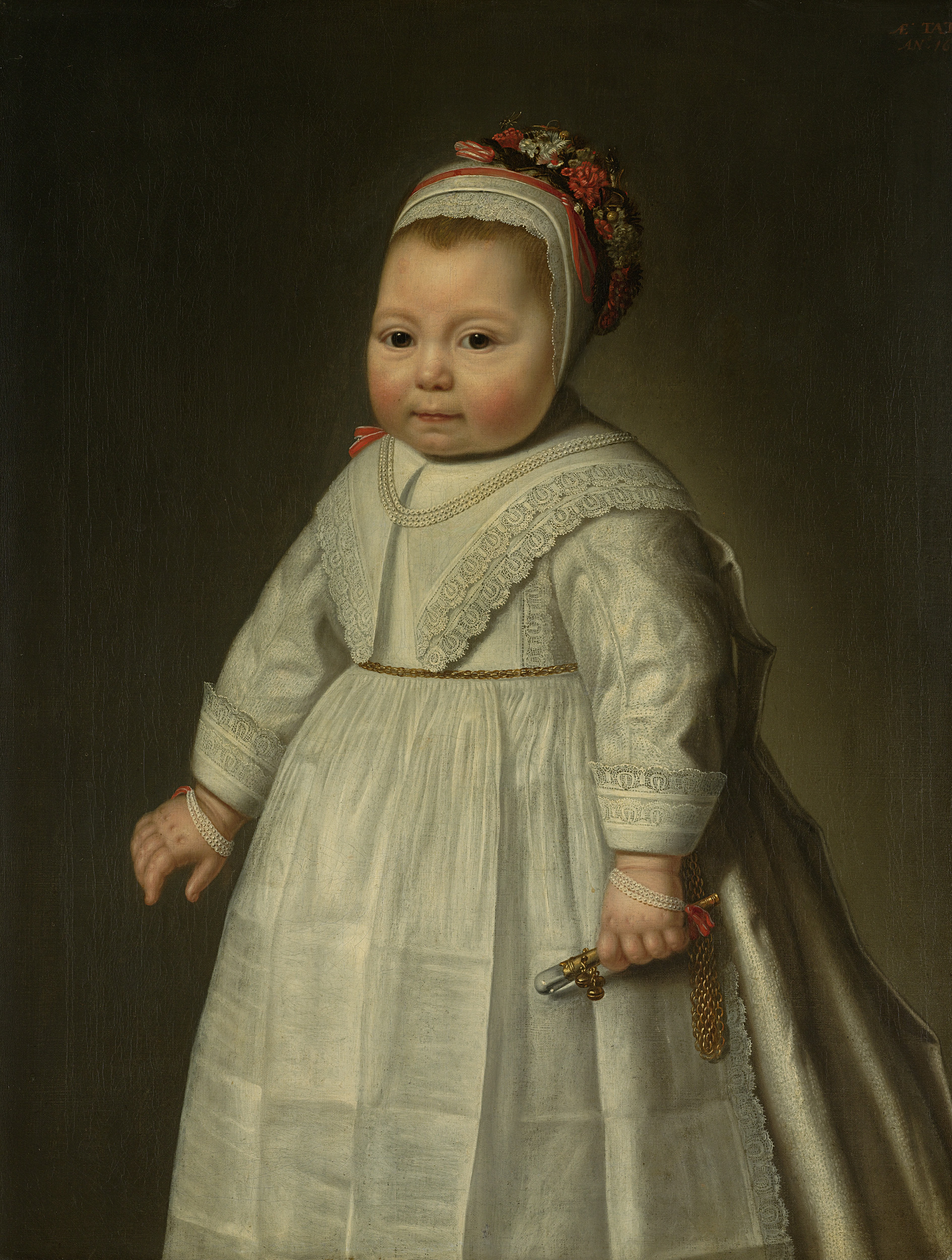 Portret van Jacoba Bontemantel (geb. 1643) als kind. Dochter van de Amsterdamse koopman Frederik Bontemantel en Agatha Hasselaer met wie hij in 1642 trouwde. Kniestuk, iets naar links, in de linkerhand een rammelaar.